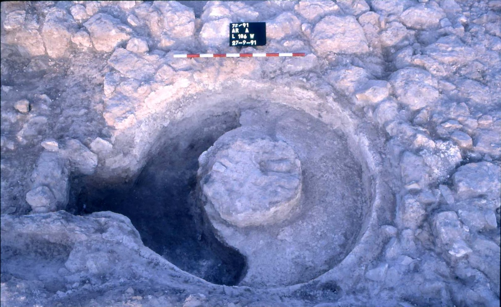 חורבת עוצה - יסוד של כבשן לכלי חרס משכבה 9. צילם הווארד סמיטליין